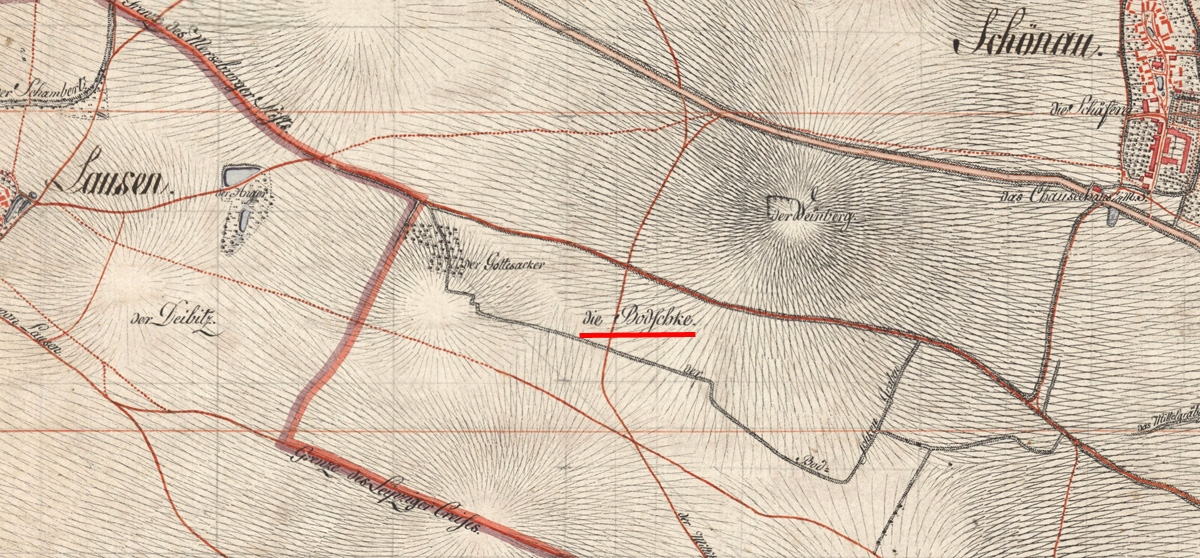 Die Pötzschker Mark als "die Bodschke" auf einer Karte um 1800 (Ausschnitt aus Meilenblätter von Sachsen 1780-1806, Berliner Exemplar, Blatt 18)